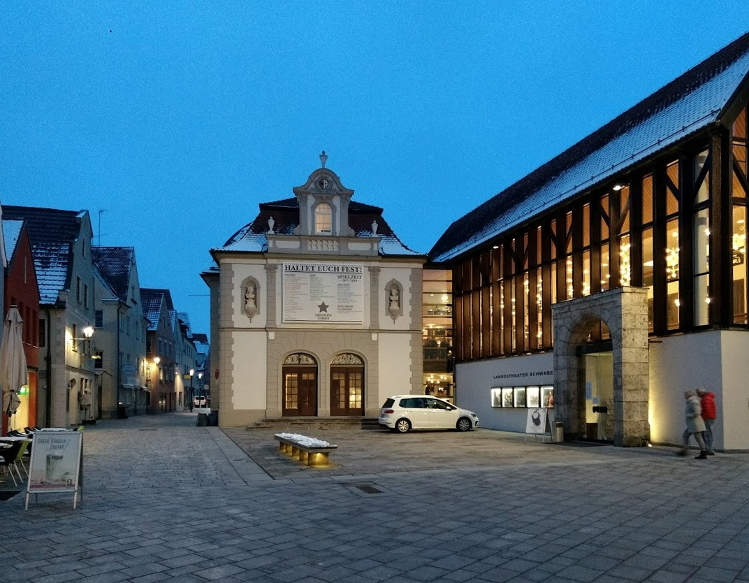 Stadttheater Memmingen, Sitz des Landestheaters Schwaben